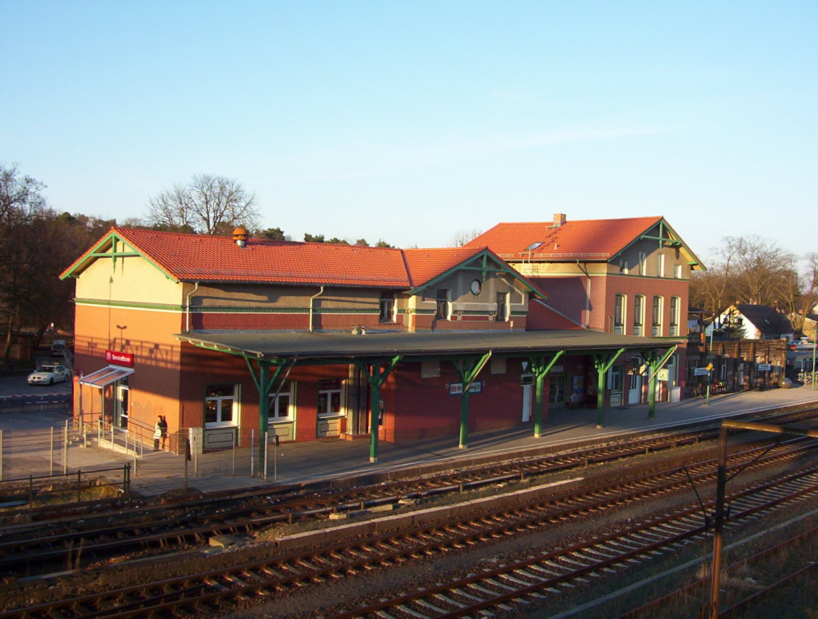 Bahnhof Strausberg an der Preußischen Ostbahn